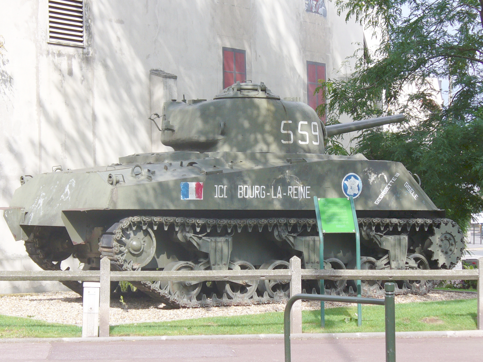 Sherman donné à la ville de Bourg-la-Reine (Hauts-de-Seine).